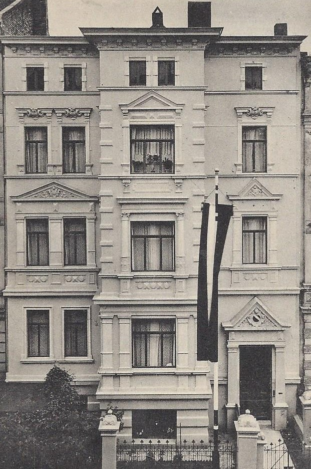 Korporationshaus des Corps Neoborussia Halle, Robert-Blum-Straße 37, ehem. Hohenzollernstraße